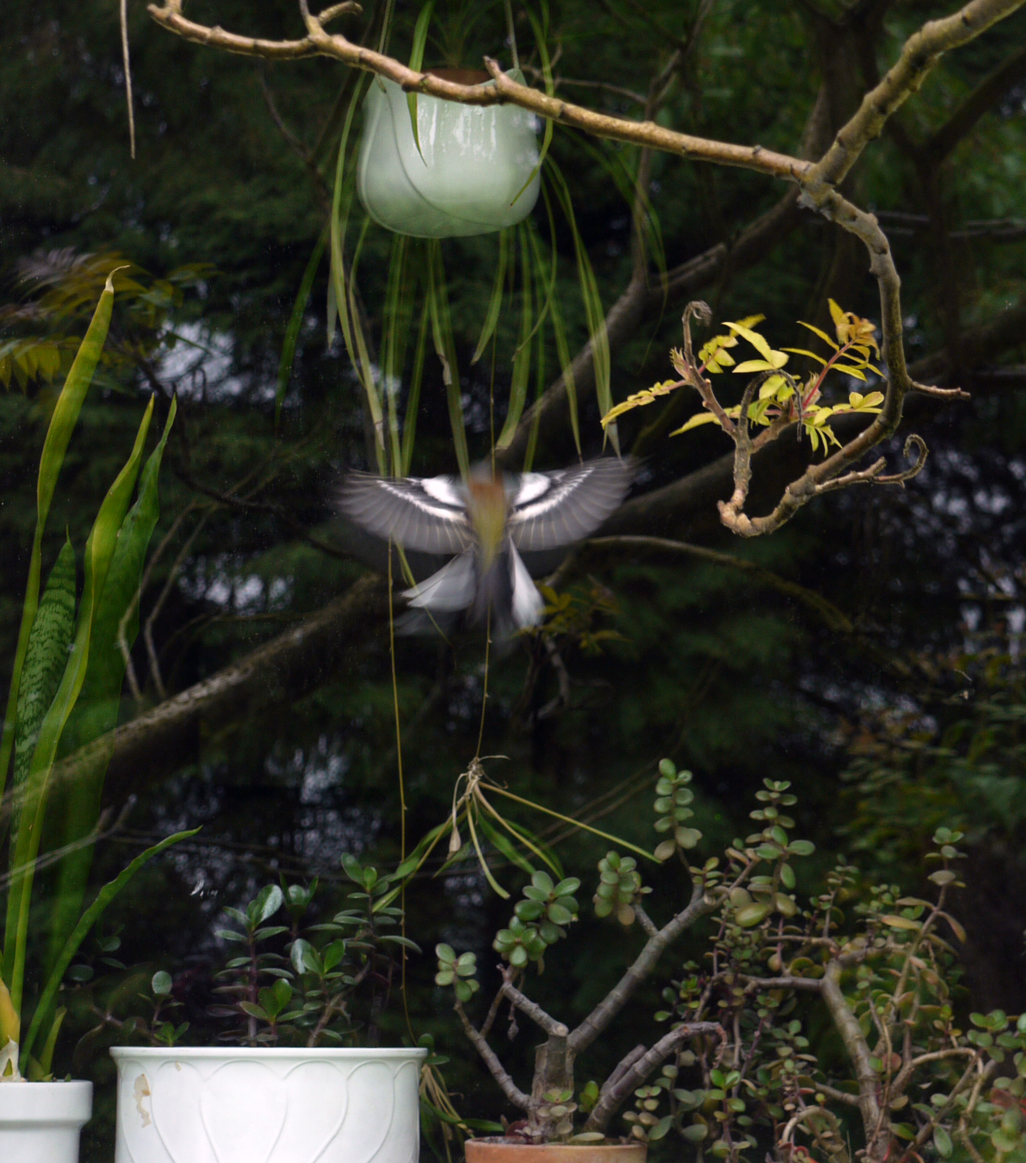 Spiegelfechter sind mitunter über Wochen und Monate nicht davon abzuhalten, ihren vermeintlichen Revierrivalen, den sie in ihrem Spiegelbild erkennen, zu vertreiben.